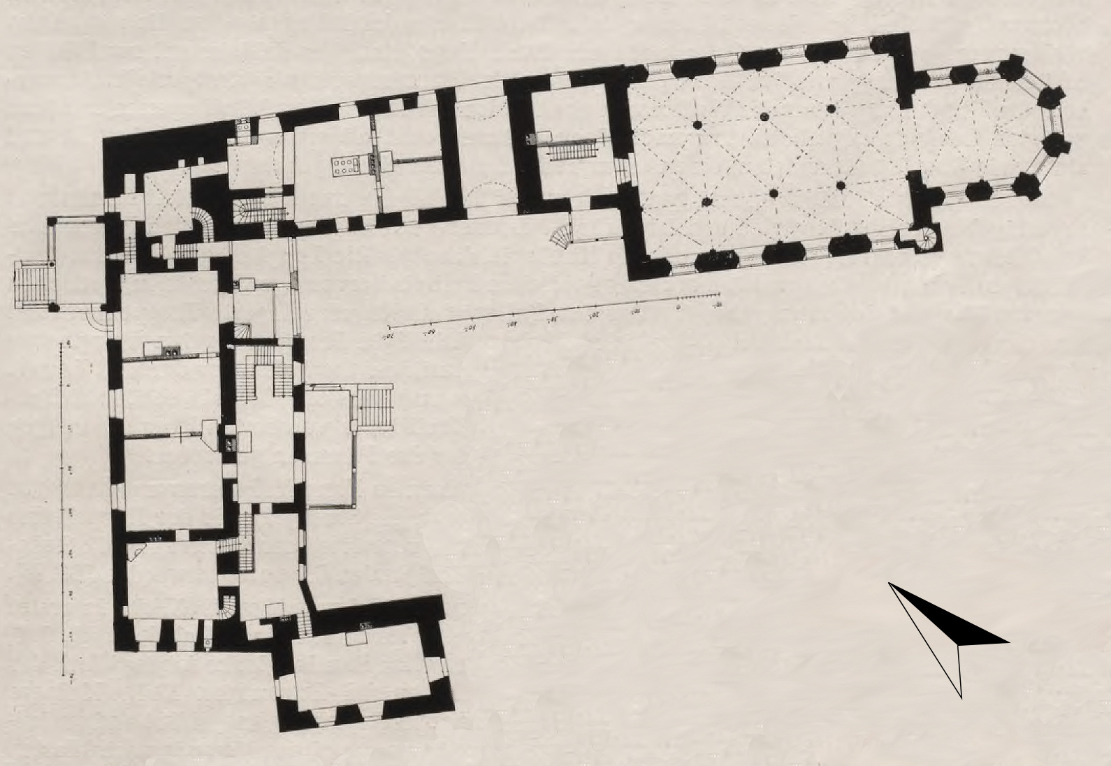 Grundriss des Schlosses Groß-Roop in Straupe, Lettland